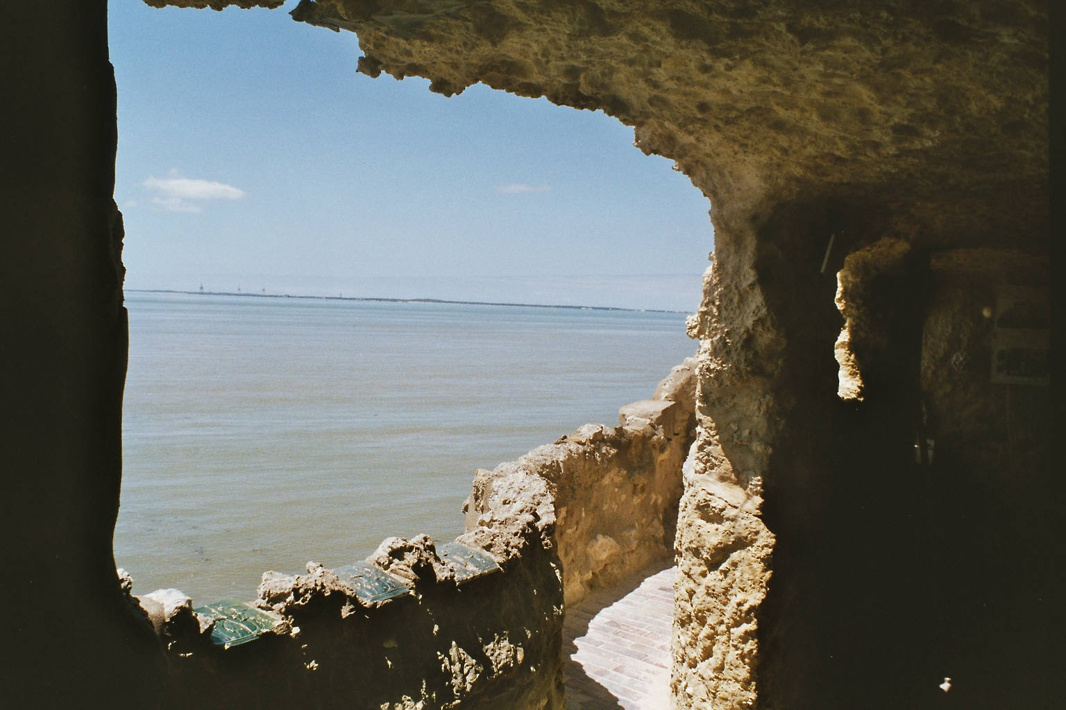 Gironde-Mündung (Frankreich) Fotograf: presse03, selbst fotografiert, Sommer 2003 Lizenz: GNU-FDL